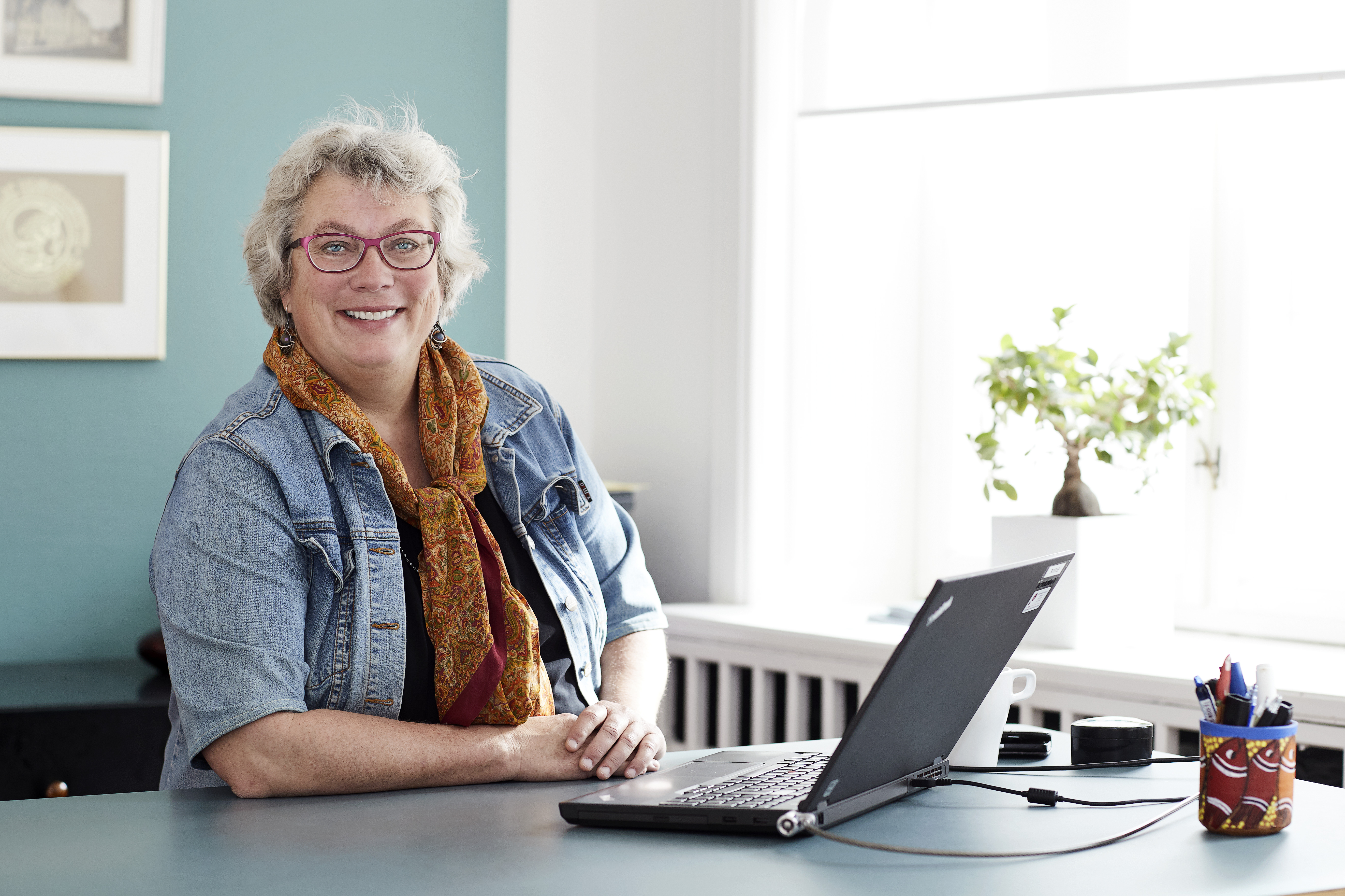 Rektor Bente Hagelund, Folkeuniversitetet København